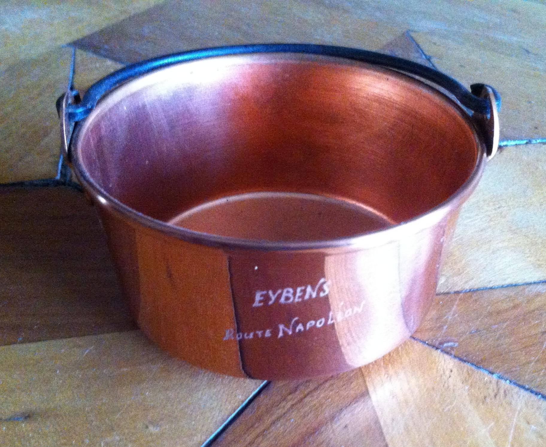 Réplique exacte au 1/8 du chaudron dans lequel l' Empereur s'est lavé les pieds dans une auberge à Eybens sur l'actuelle Place de Verdun le 7 mars 1814 vers le soir, pieusement conservée par une famille eybinoise.